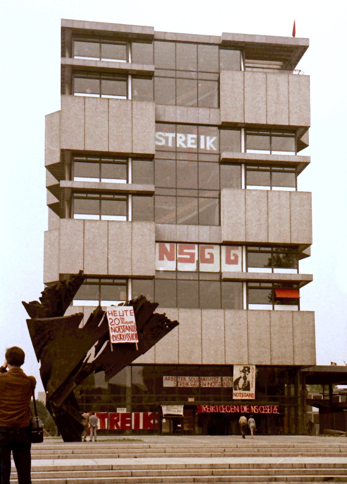 Transparente am Architektur-Gebäude der TU Berlin im Protest gegen die Verabschiedung der Notstandsgesetze